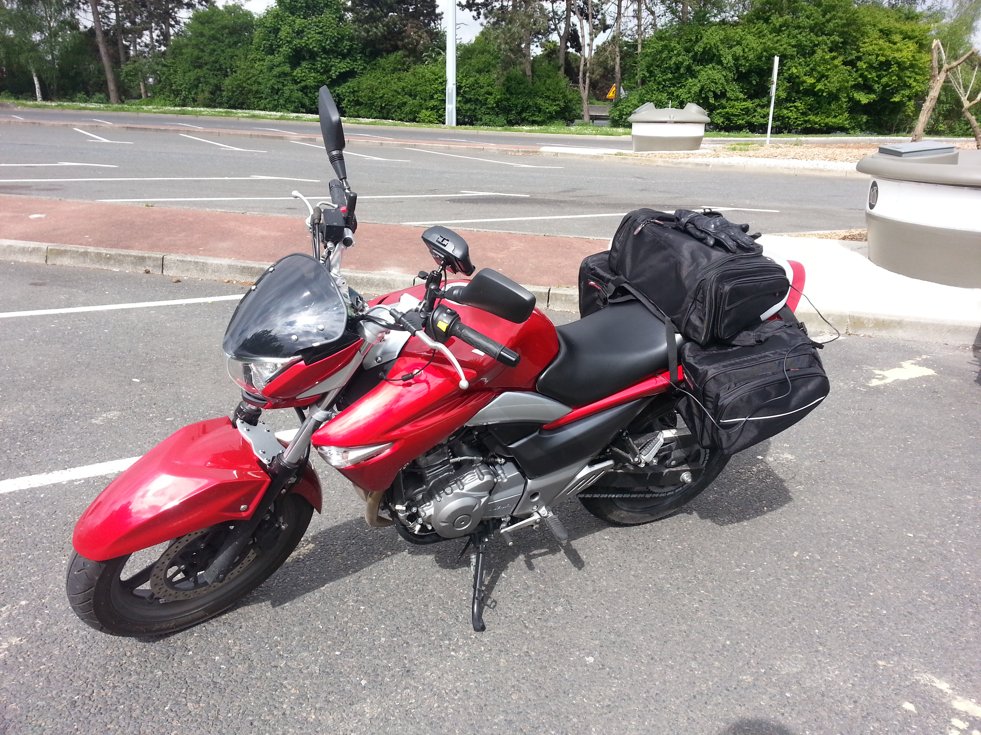 3/4 gauche